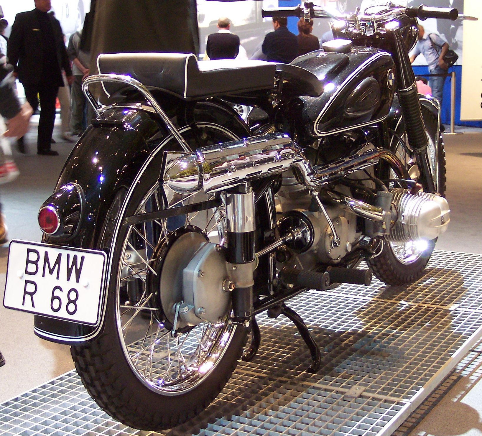 BMW R68